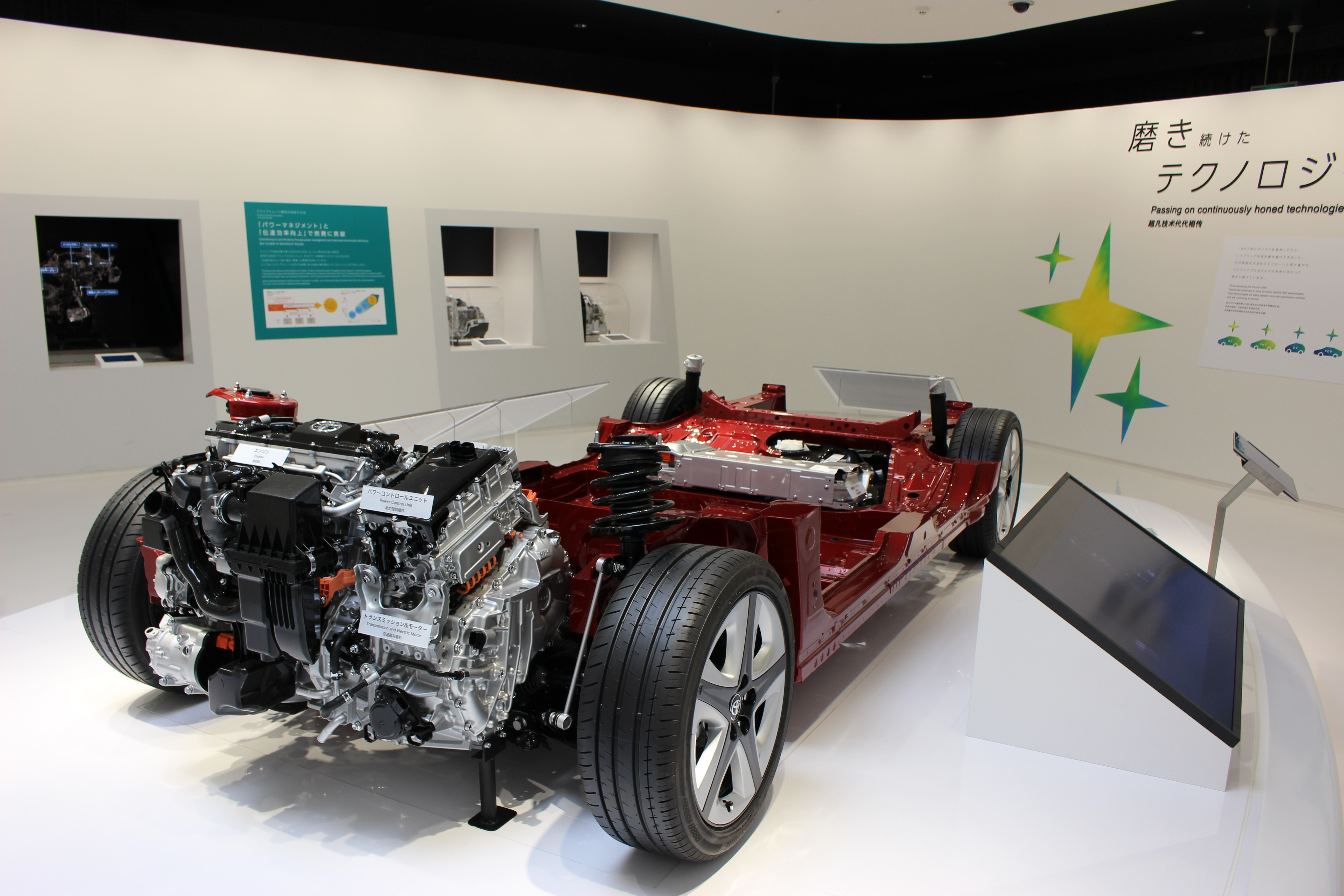 プリウスの中身